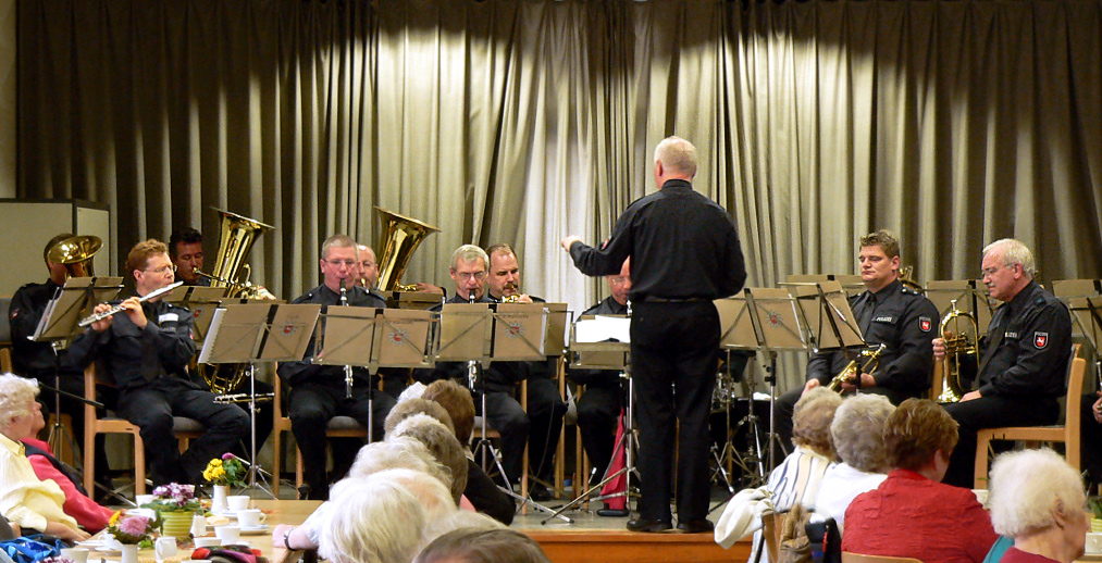 Polizeimusikkorps Niedersachsen